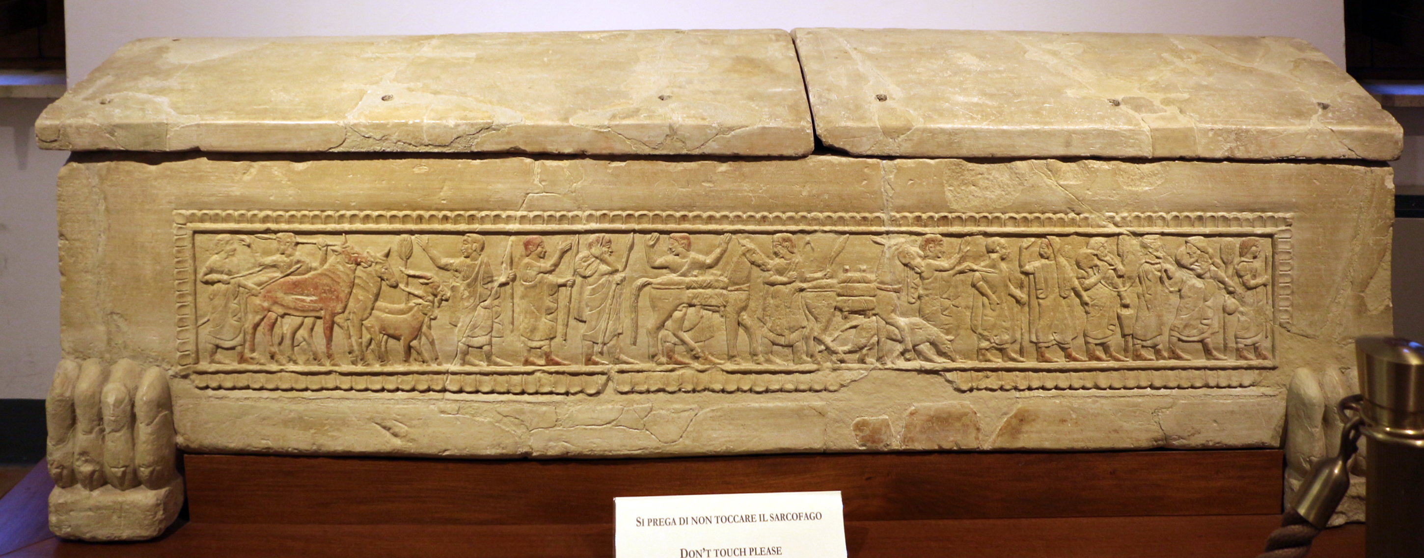 Museo Archeologico Nazionale dell'Umbria This is a photo of a monument which is part of cultural heritage of Italy.